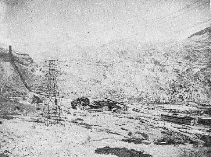 Vista general de la Fundición Caletones.